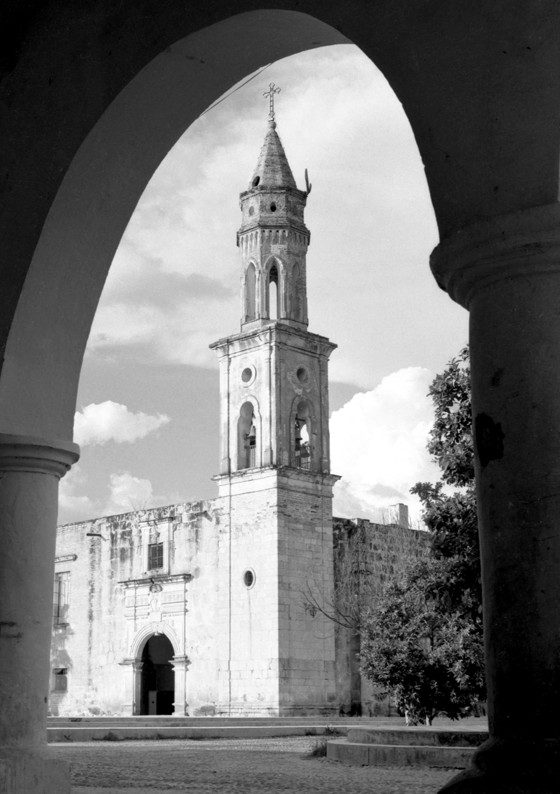 Fotografía tomada en 1964